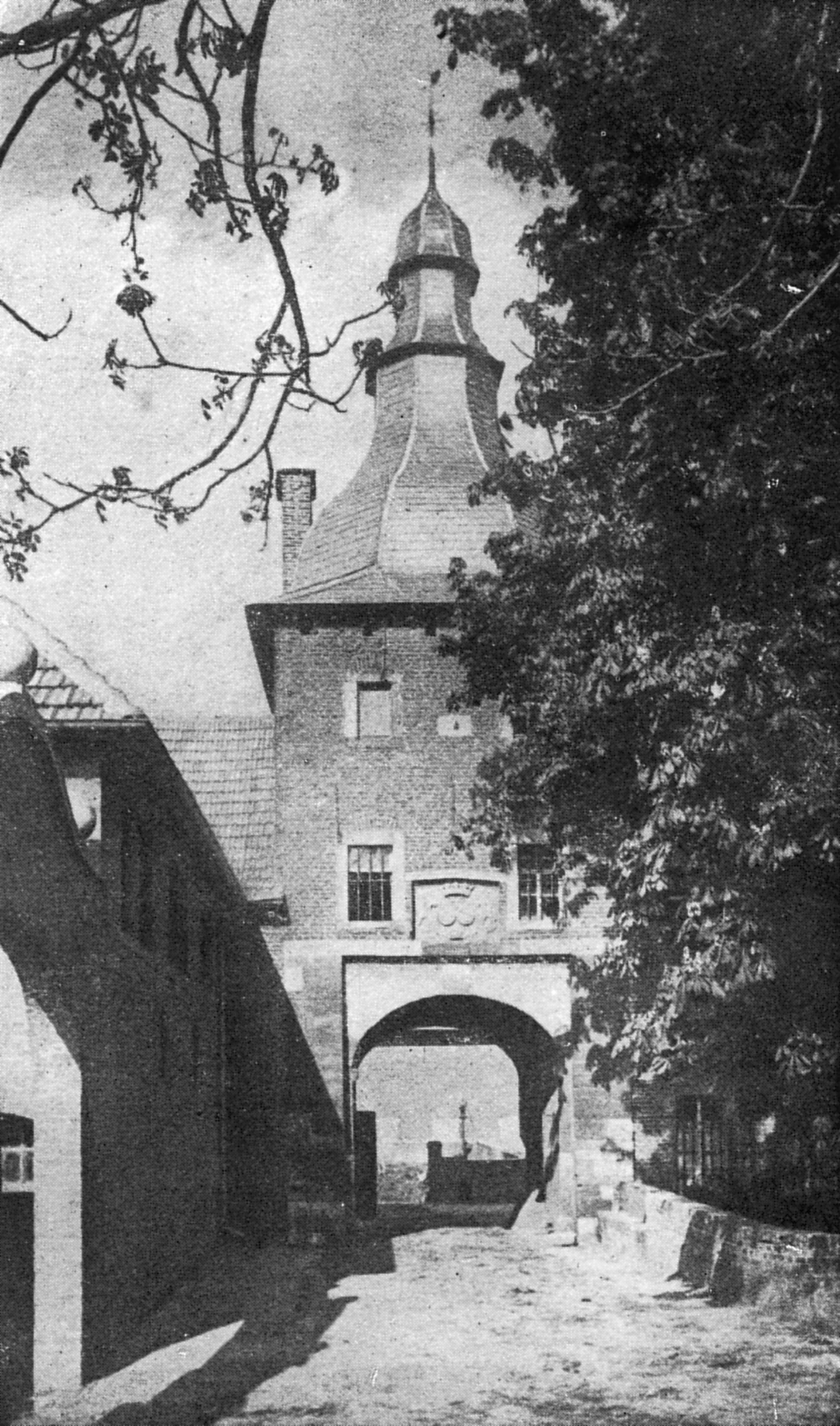 Torturm des Ritterguts Hausen